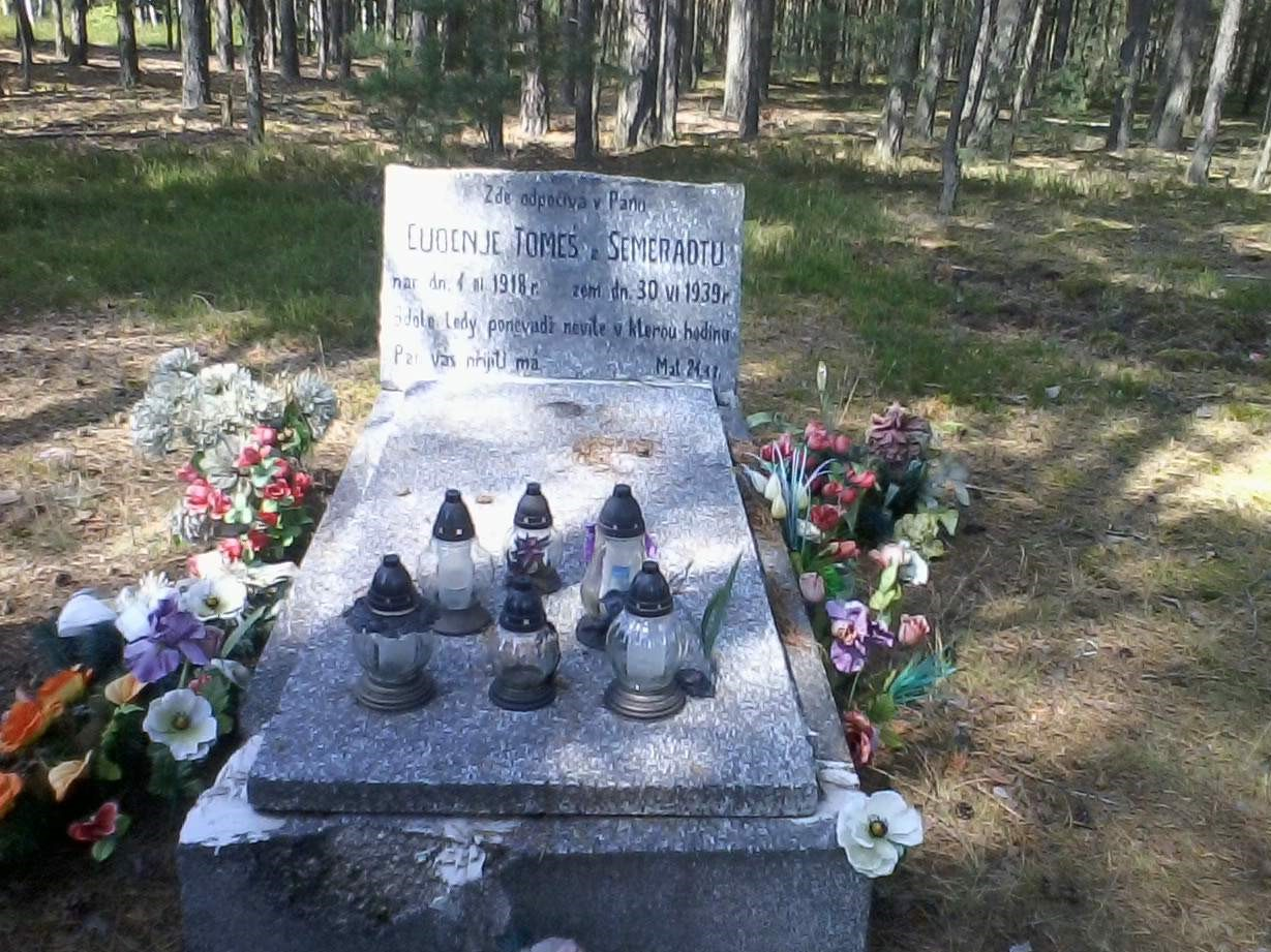 zanikající český hřbitov, Faustynov (u Zelova) v Polsku